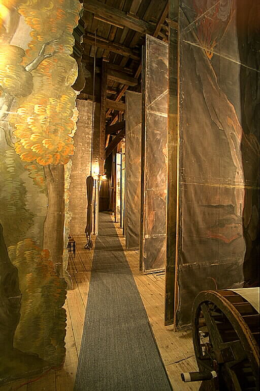 Teatersalongen. Motiv: Drottningholm Nyckelord: Byggnadsminnen:Statl, Världsarv Kategori: TeaterTeatersalongen.